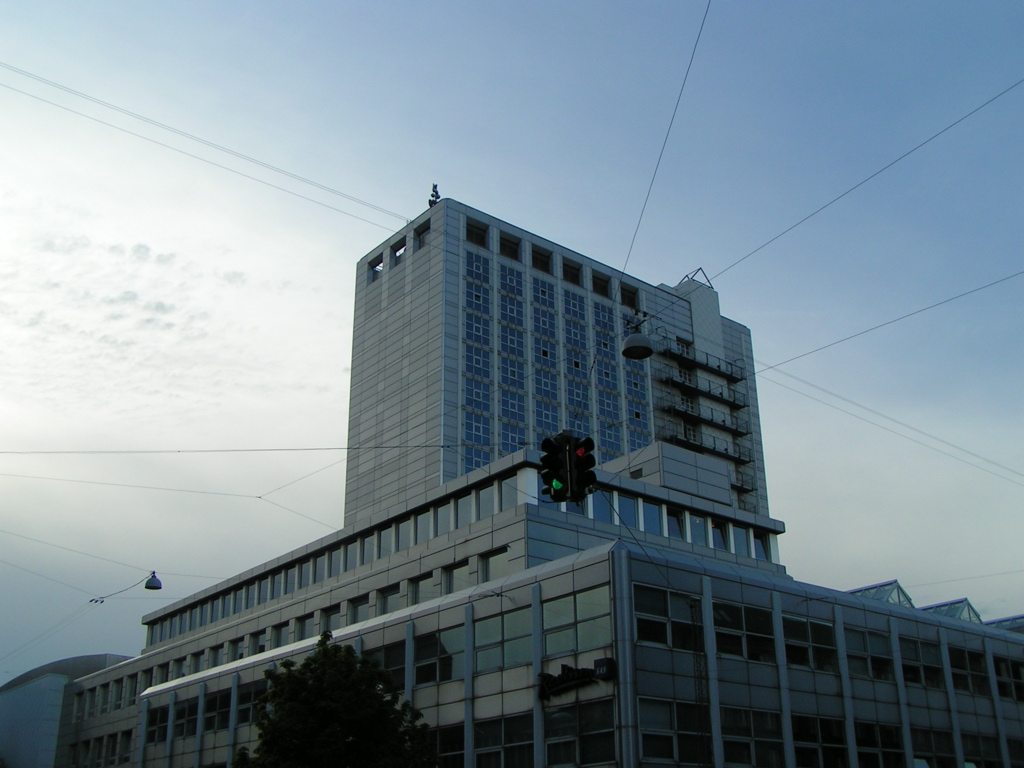 The Falkoner Centre in Falkoner Allé in Copenhagen, Denmark